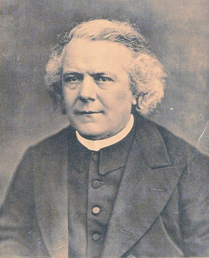 Paleontologist Antonio Stoppani